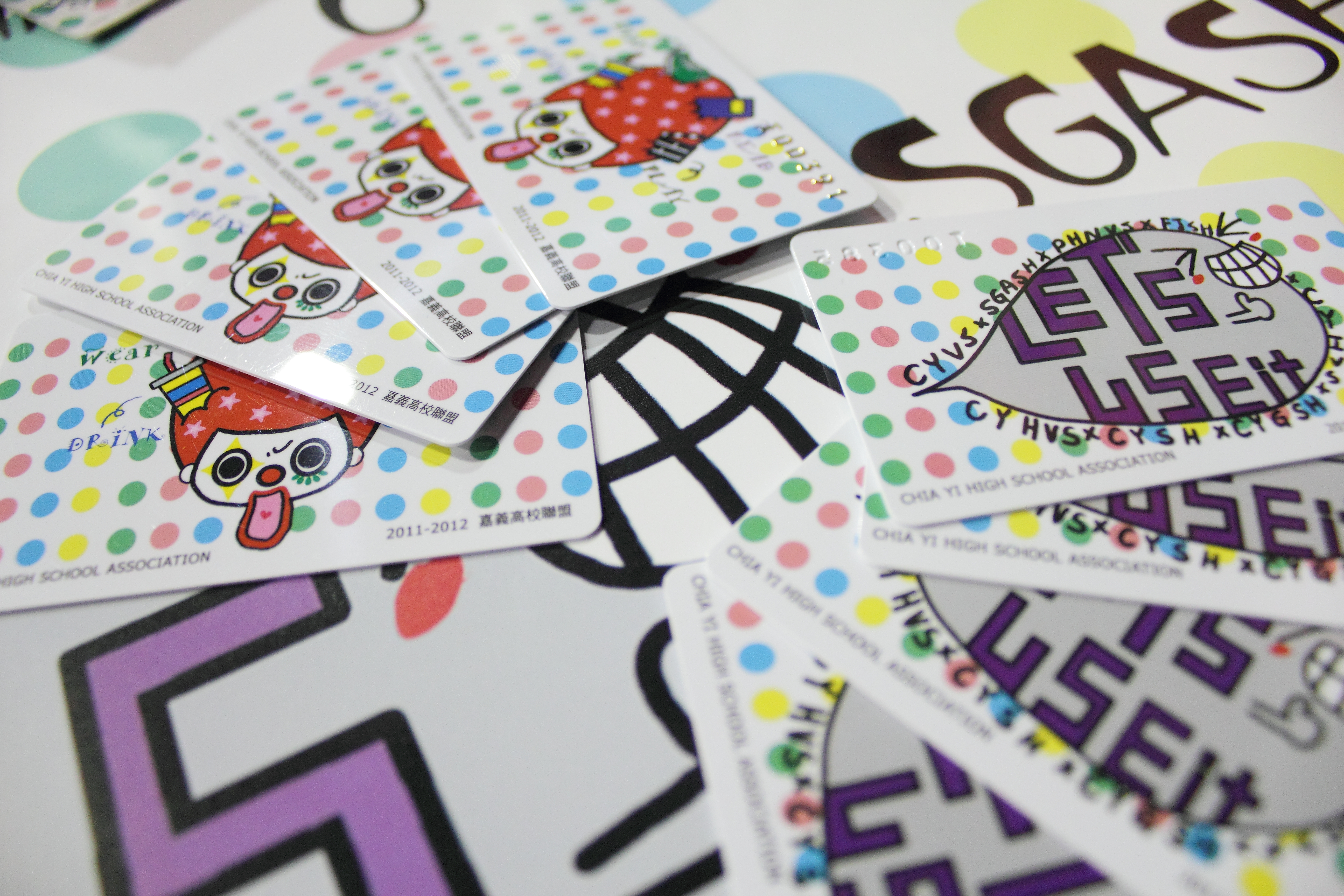 中文（台灣）: 嘉義高校聯盟特約卡2011-2012